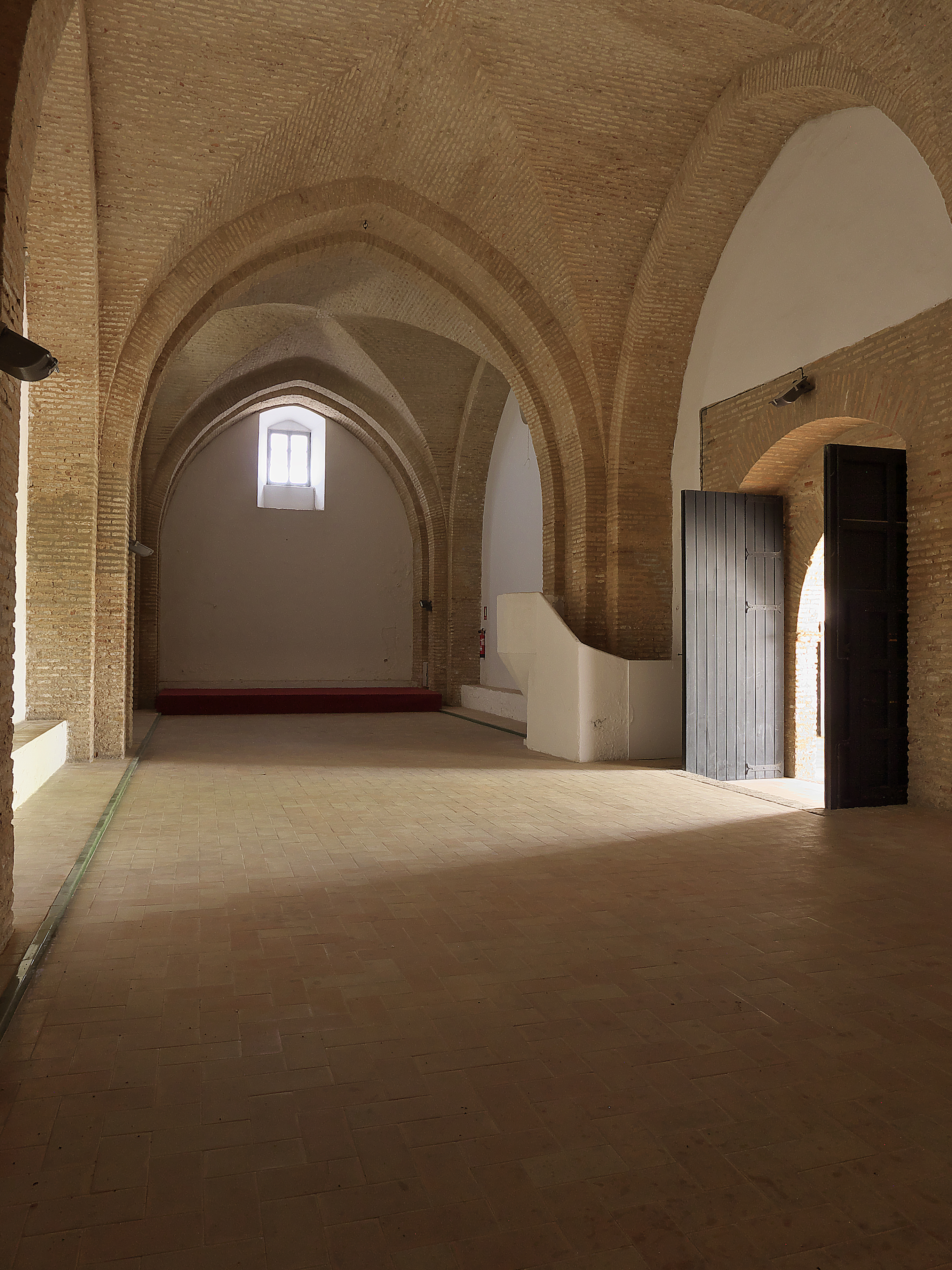 Refectorio monacal (s. XIV)